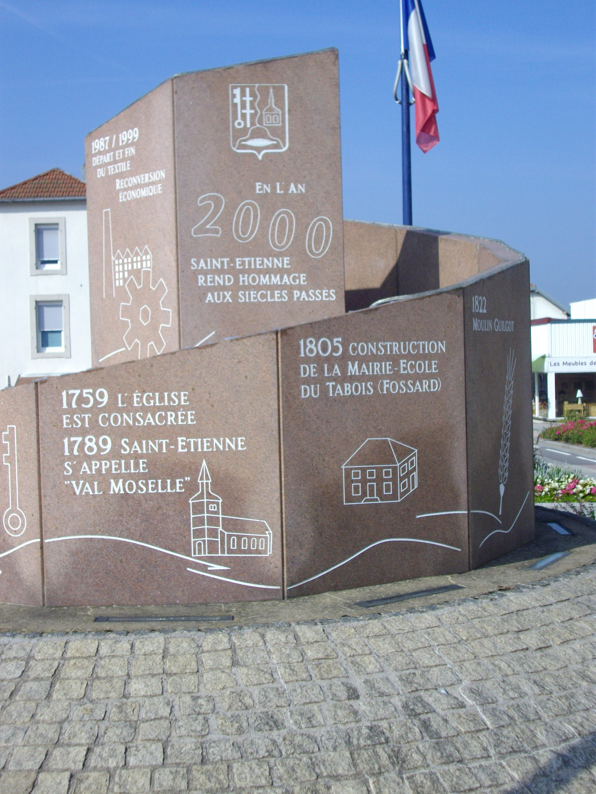 Commune de Saint-Etienne-lès-Remiremont (Vosges). Monument inauguré le jour de la Saint-Etienne en l’an 2000 : Saint Etienne rend hommage aux siècles passés.